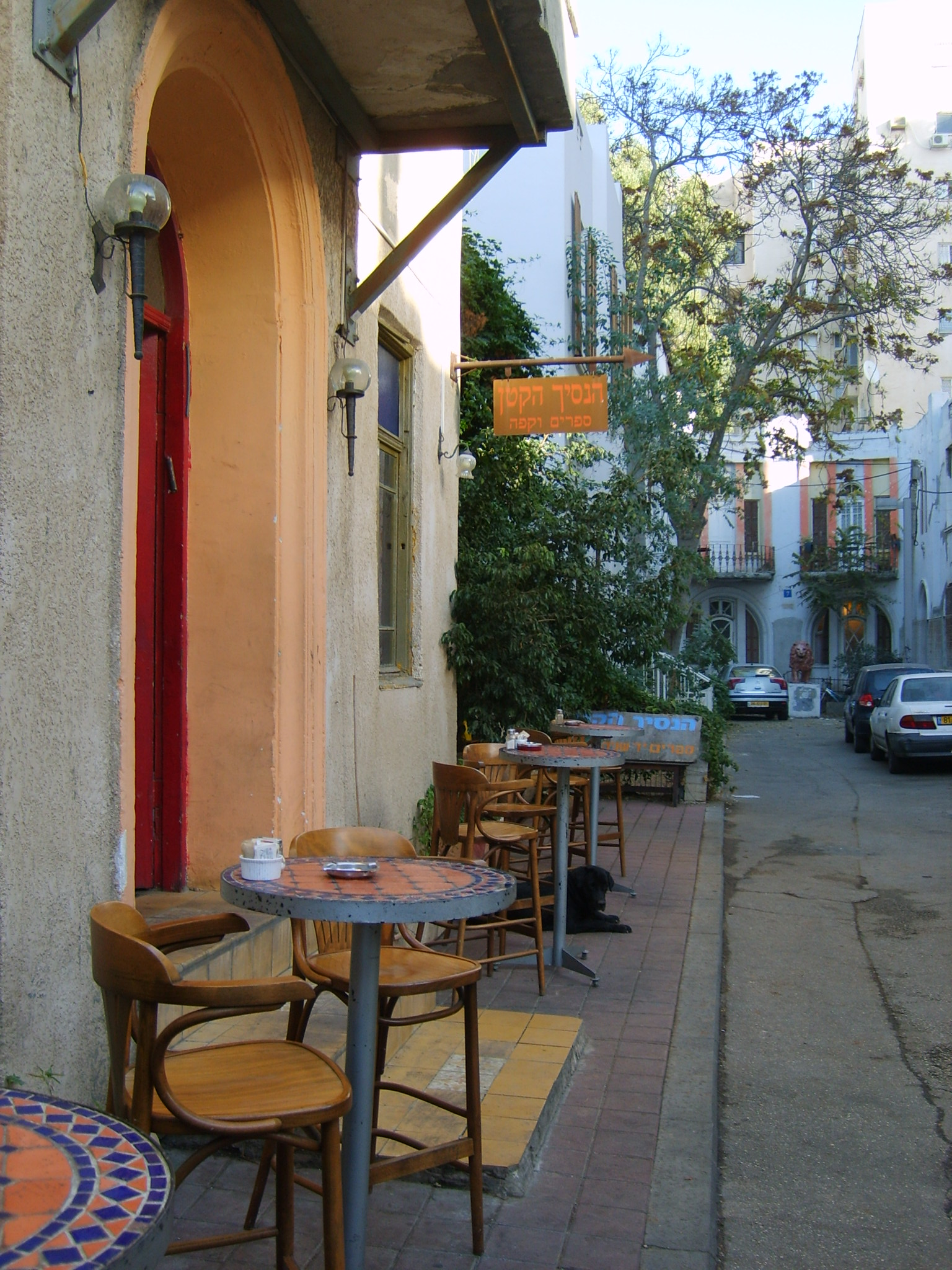 בית הקפה הנסיך הקטן בתל אביב